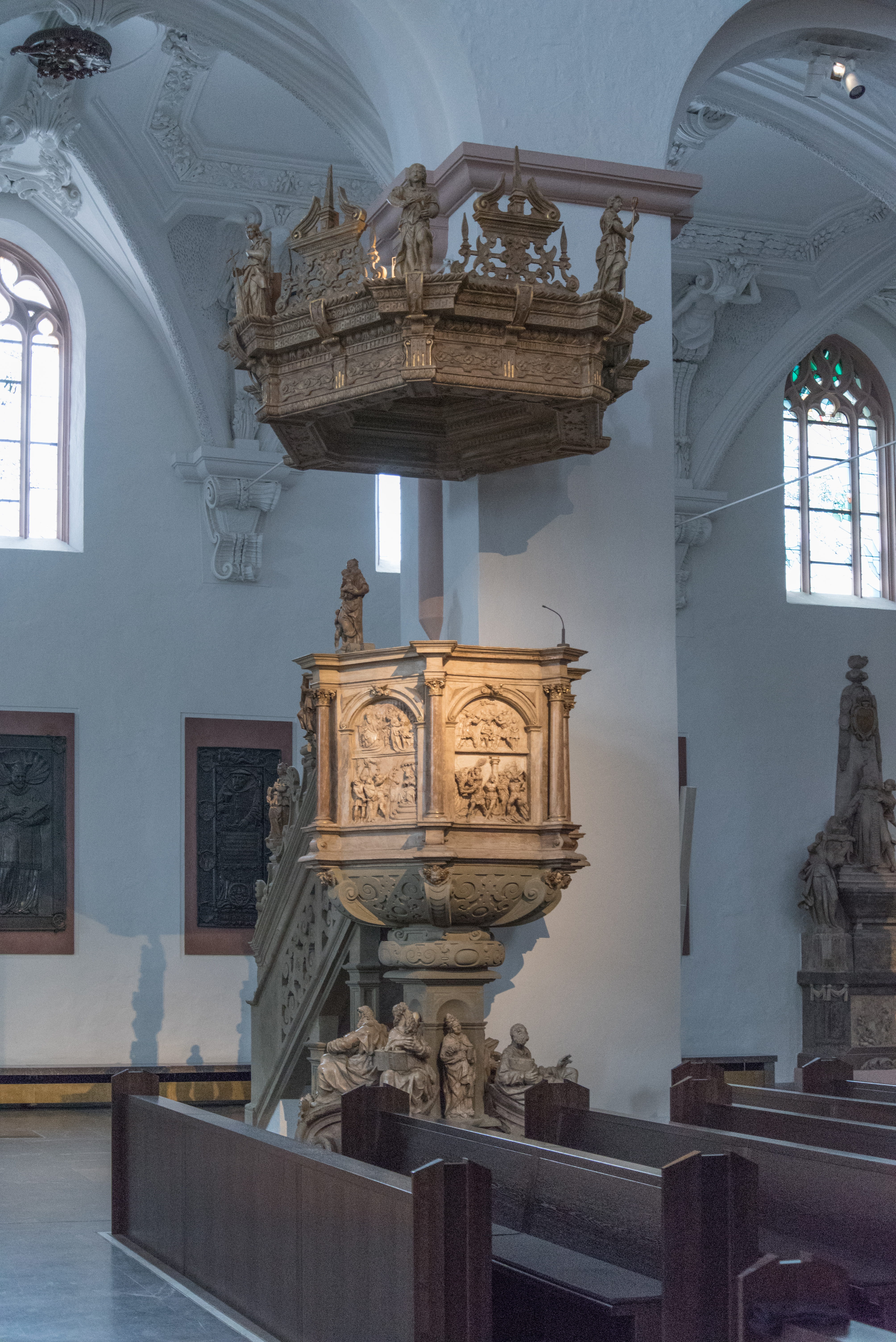 Würzburg, Dom, Kanzel